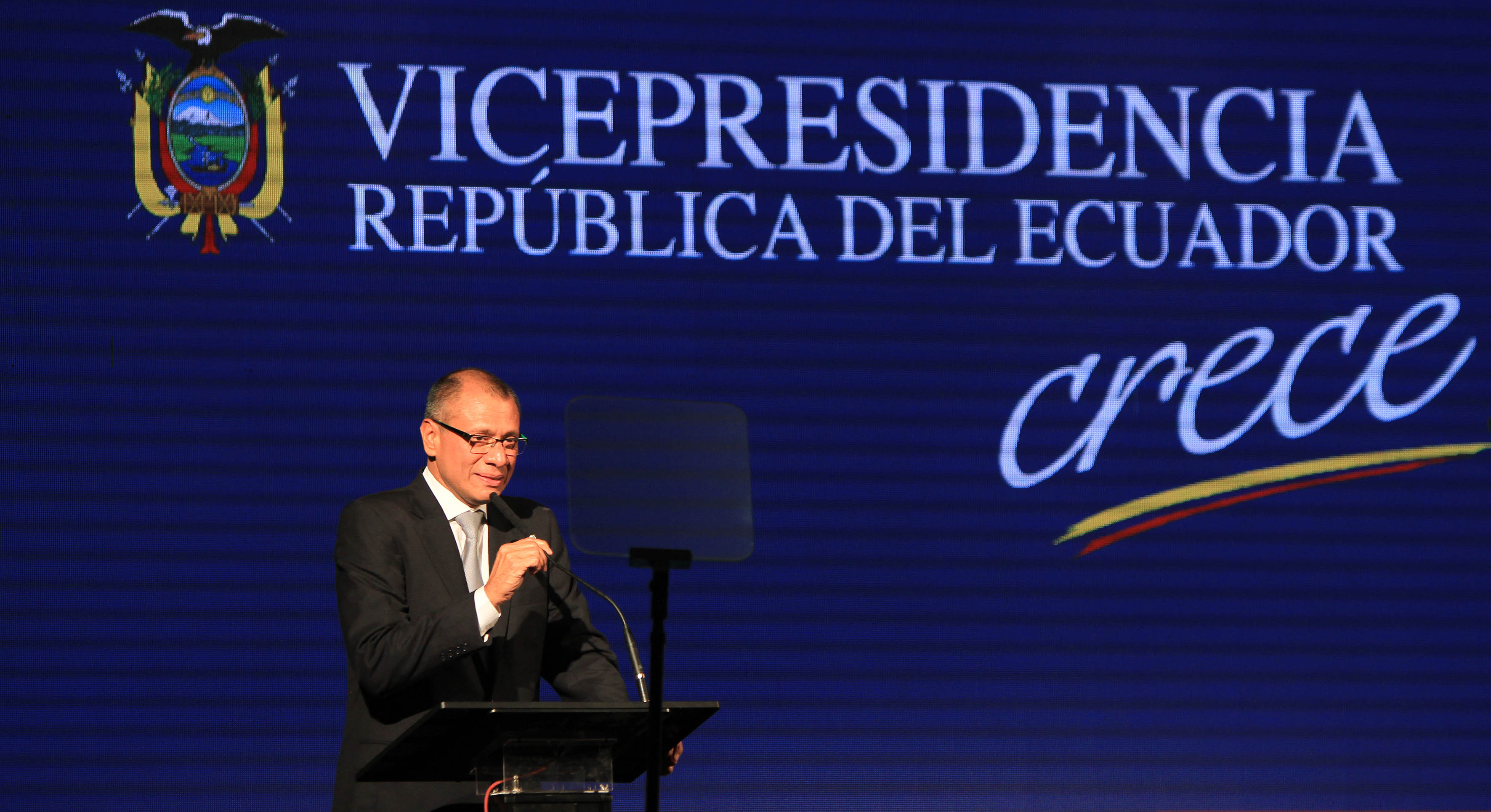 Guayaquil, lunes 02 de febrero del 2015 (ANDES).-El vicepresidente Jorge Glas Espinel participó de la inauguración del Encuentro Internacional de Inclusión Productiva, que se realizó en el Centro de Convenciones Simón Bolívar Foto:César Muñoz/ANDES